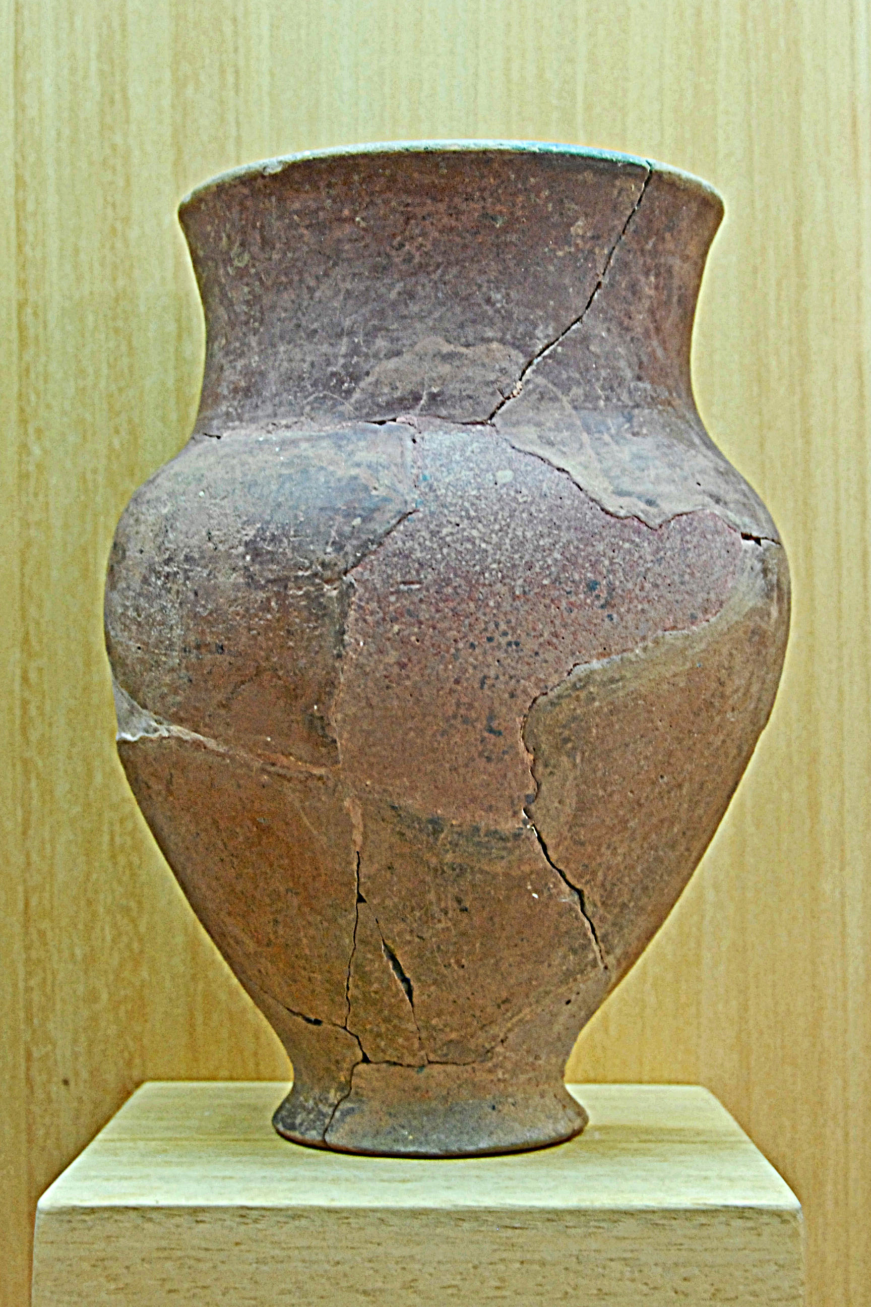 Civaux, Museum, große Keramikvase